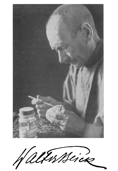 Walter Beick (d. 1933)